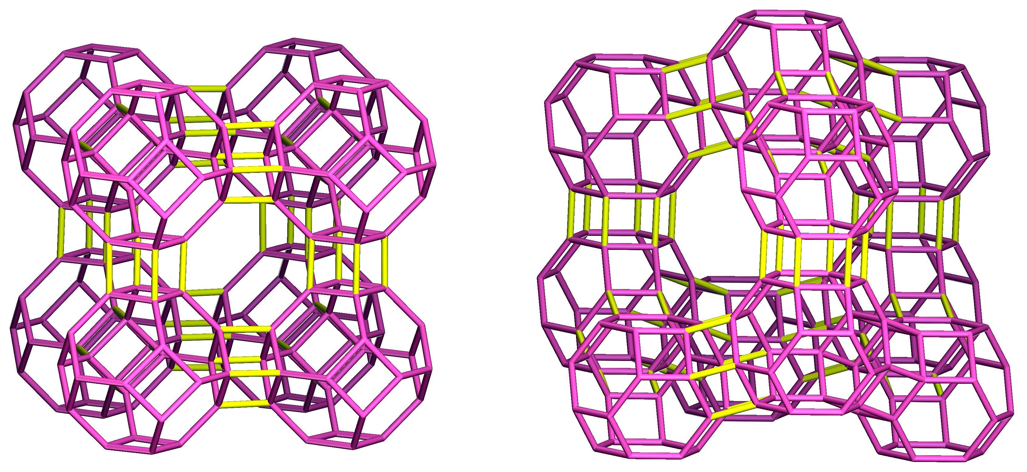 LTA型ゼオライトとFAU型ゼオライトの構造比較。両者はソーダライトケージ (桃色) を共通構造として持つが、それらの繋がり方が異なる (黄色)。LTAではソーダライトケージの4員環同士が繋がり、FAUでは6員環同士が繋がっている。